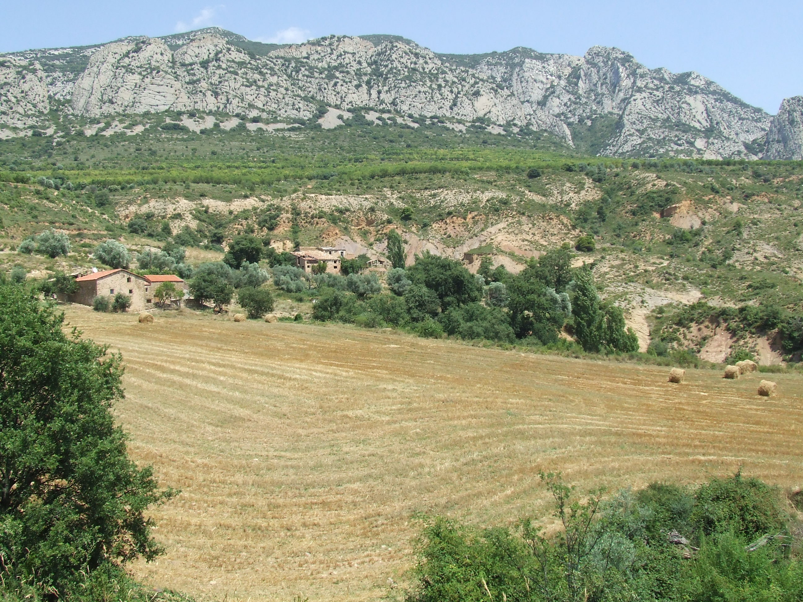 Cal Serret de Núria i Cal Moixarda (Abella de la Conca, Pallars Jussà)